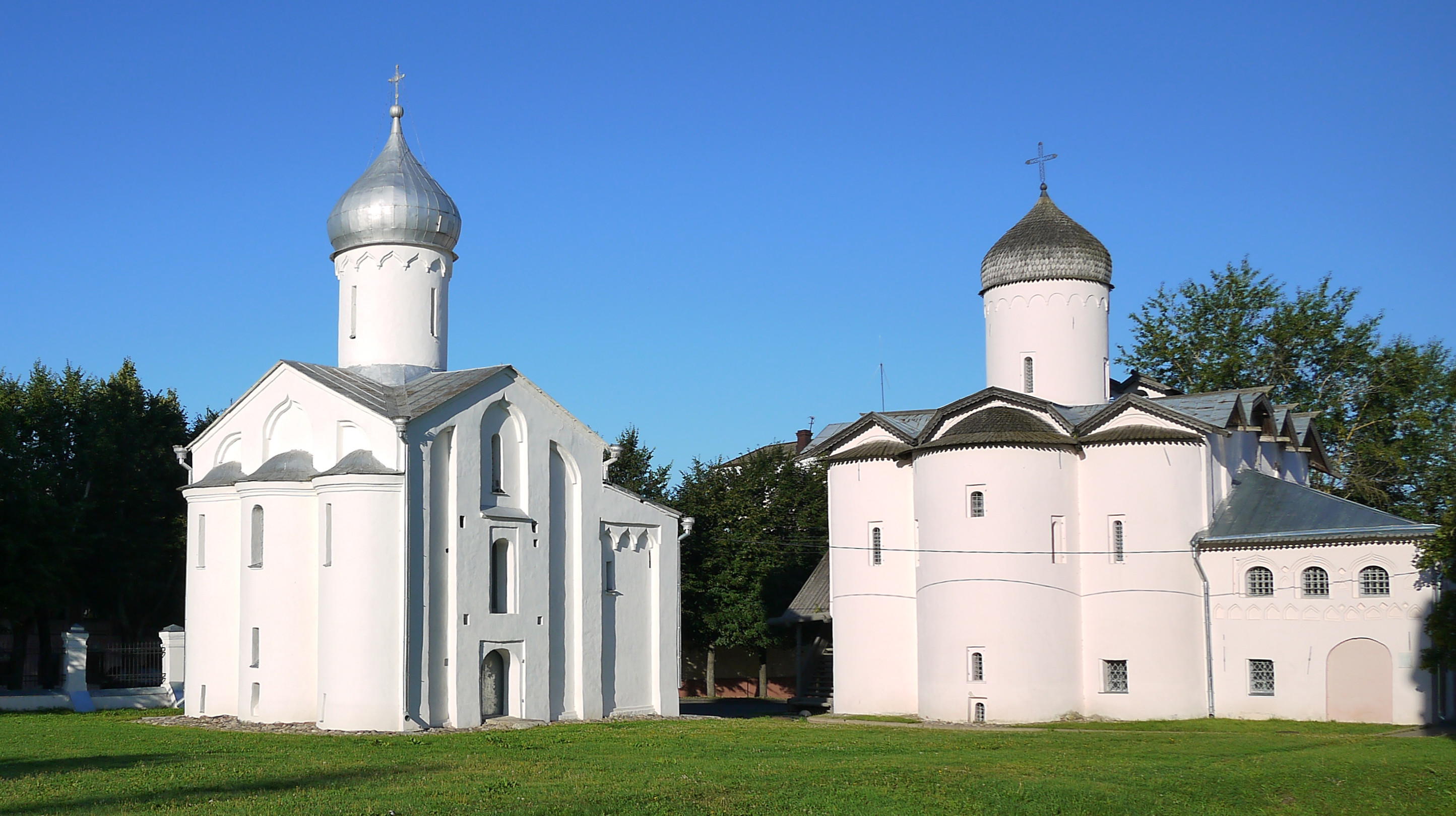 Церковь преподобного Прокопия (Новгородская область, Великий Новгород, Ярославово Дворище)